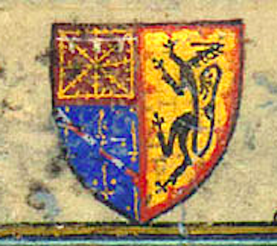 Coats of arms following marriage Evreux-Longueville with Flanders